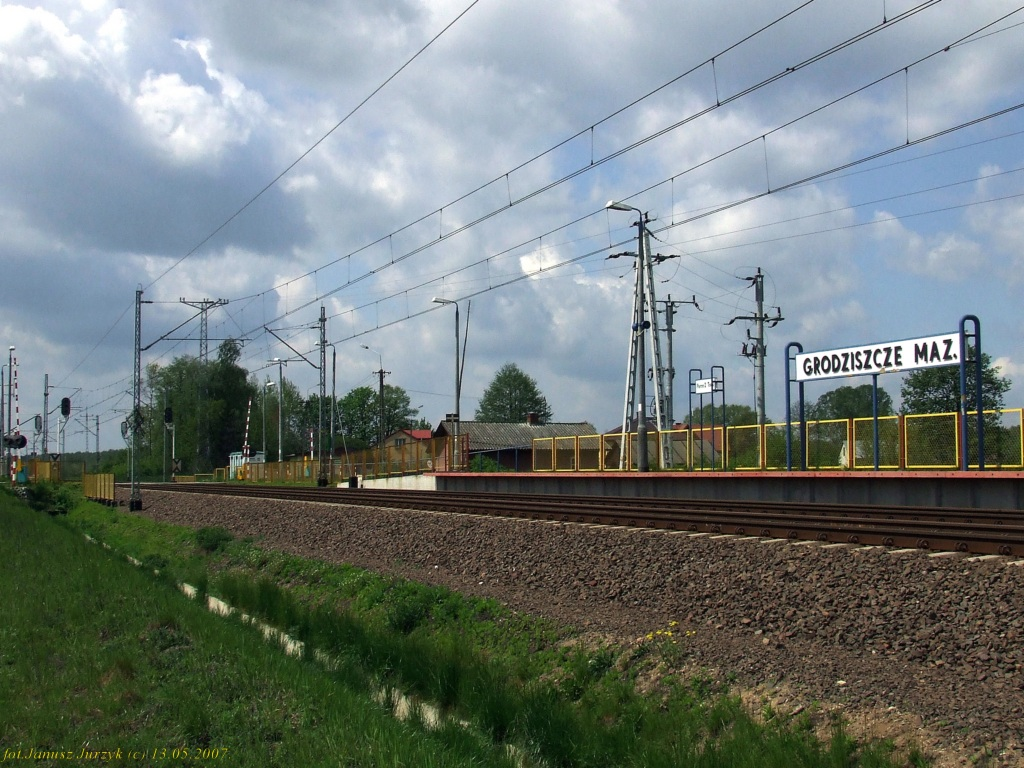 Przystanek osobowy Grodziszcze Mazowieckie.